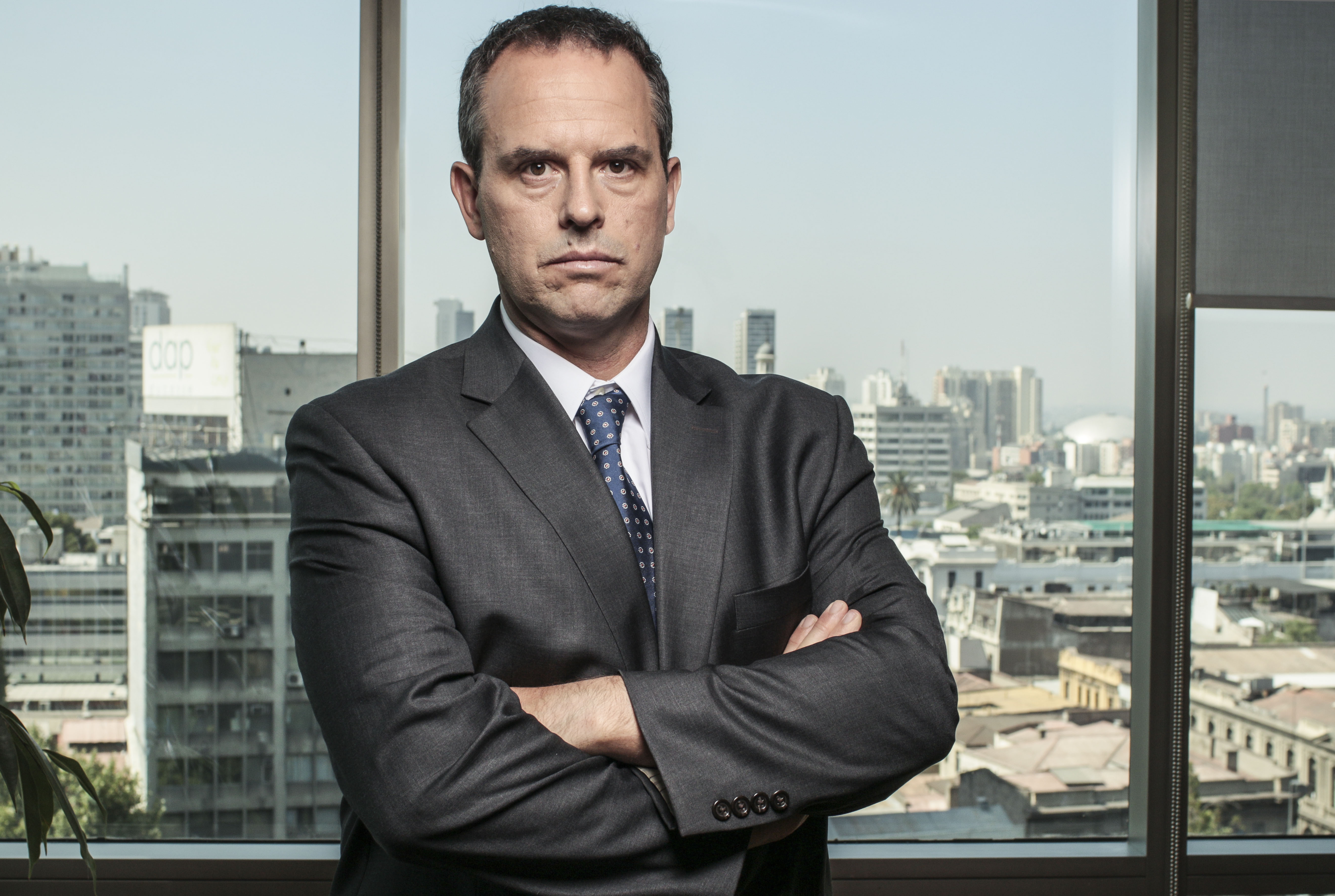 Kevin Cowan